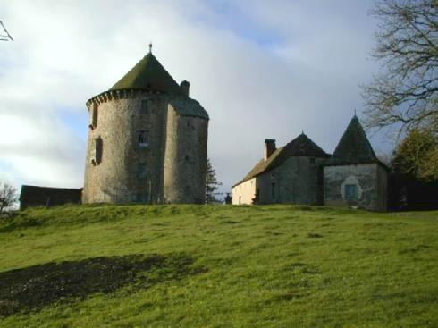 Restes de l'ancien château du Cauffour à Caudes-Aigues (15)